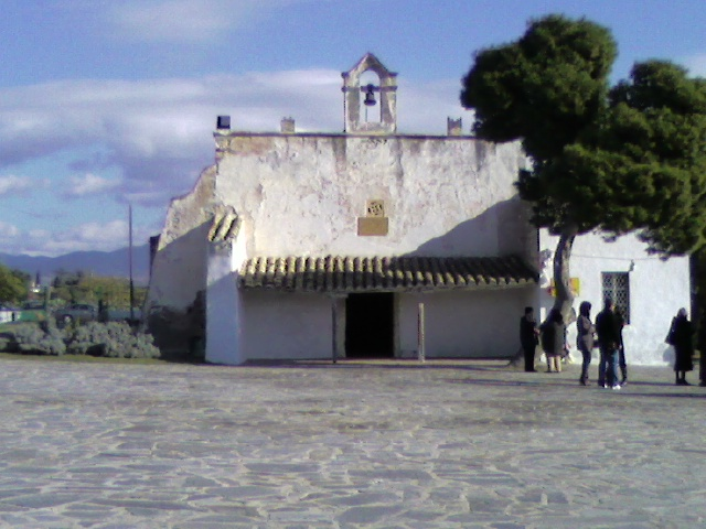 Foto personale, scattata il 02/12/07 con cellulare Samsung SGH-Z230, raffigurante la Chiesa di Sant'Andrea a Quartu Sant'Elena.